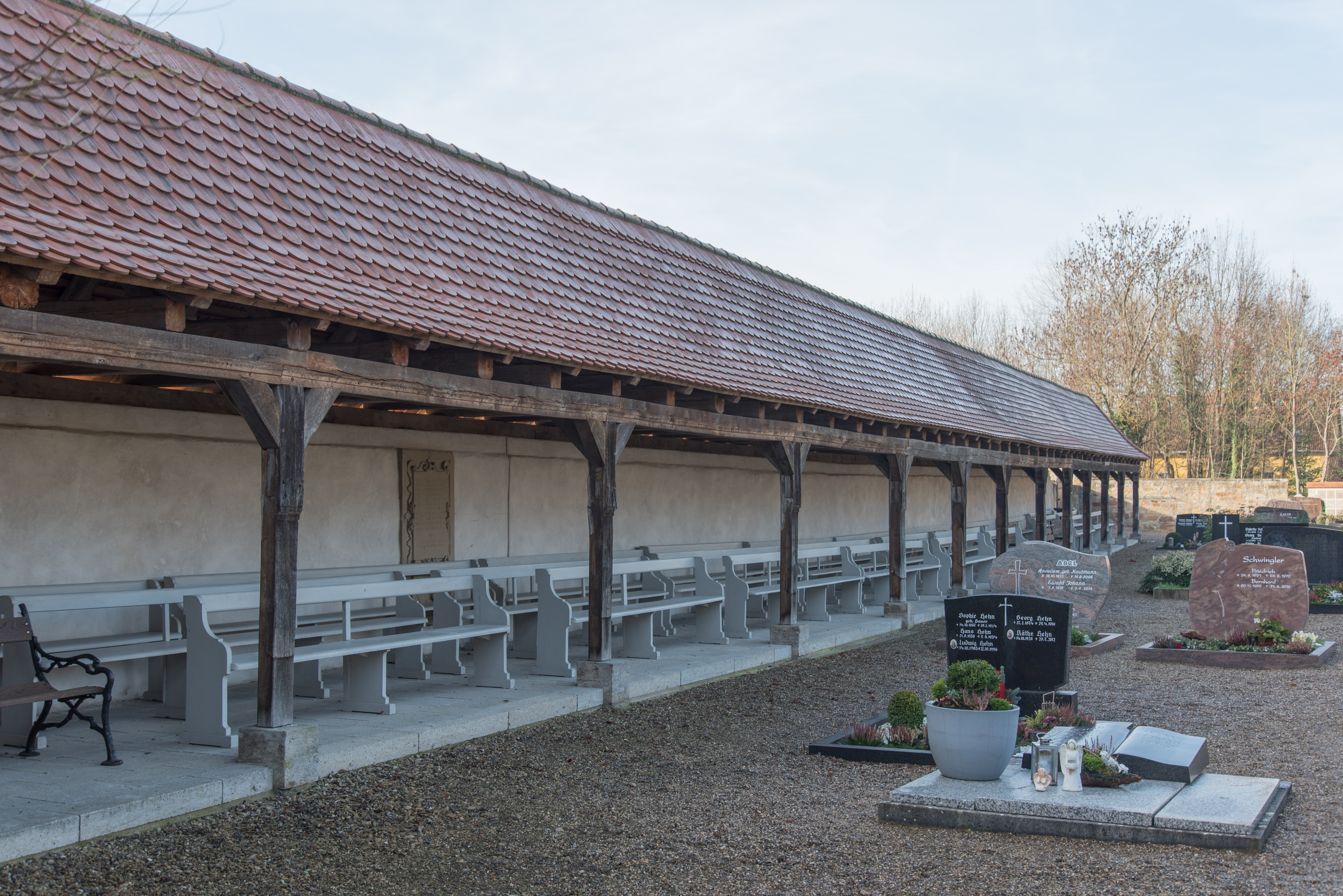 Prichsenstadt, Bahnhofstraße 1, Friedhof